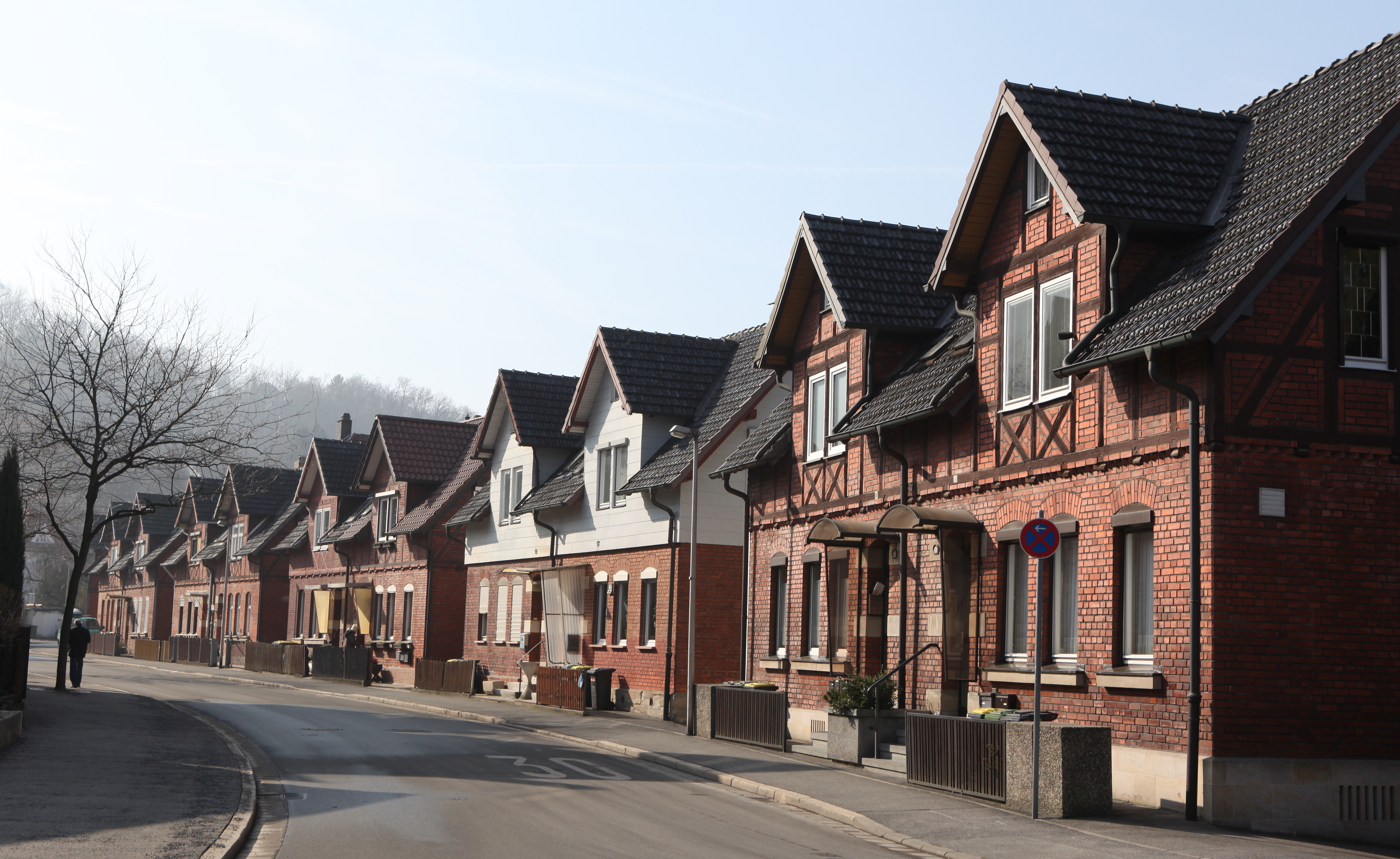 Hahnweg in Coburg